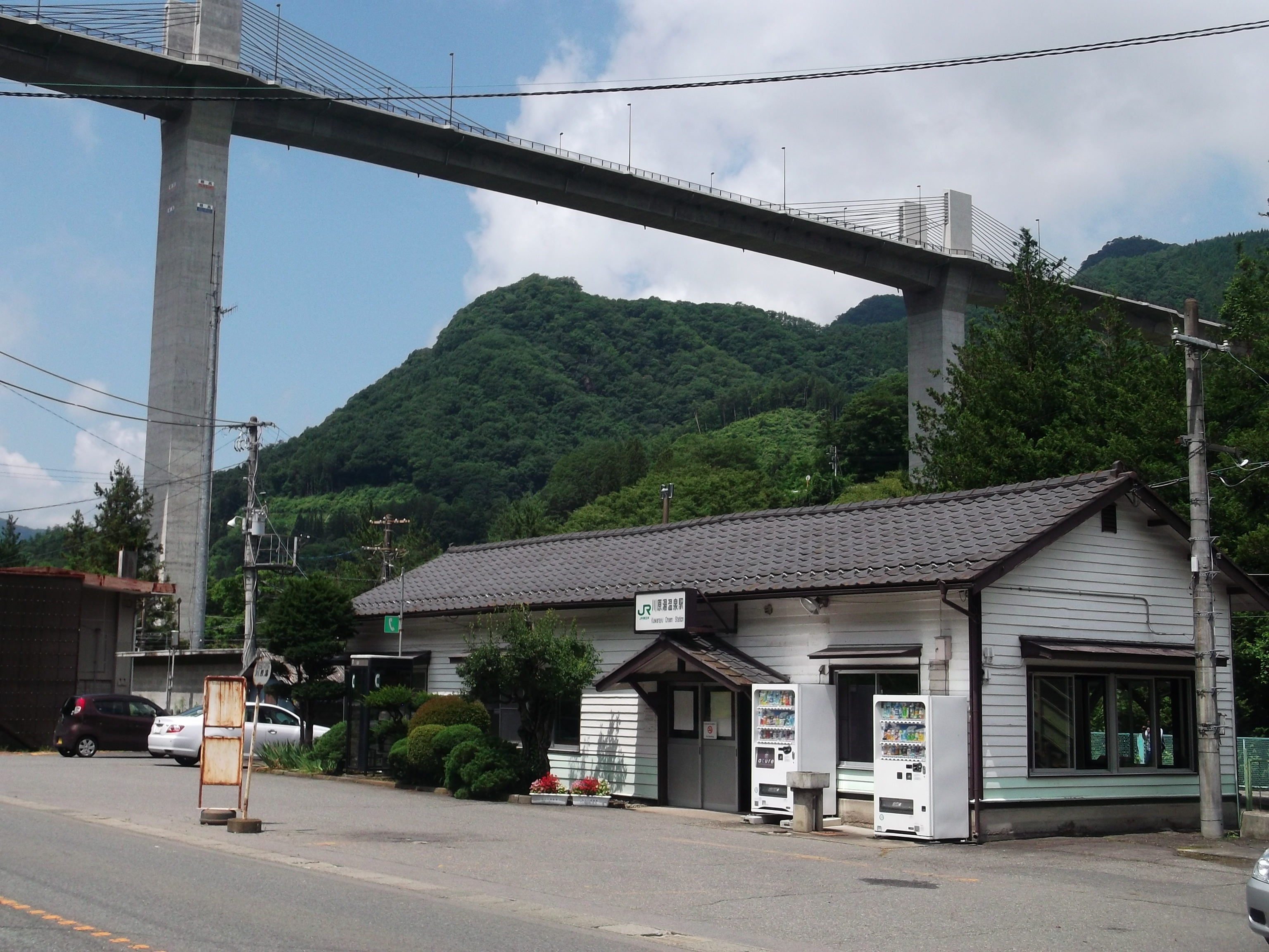 川原湯温泉駅と建設中の湖面１号橋